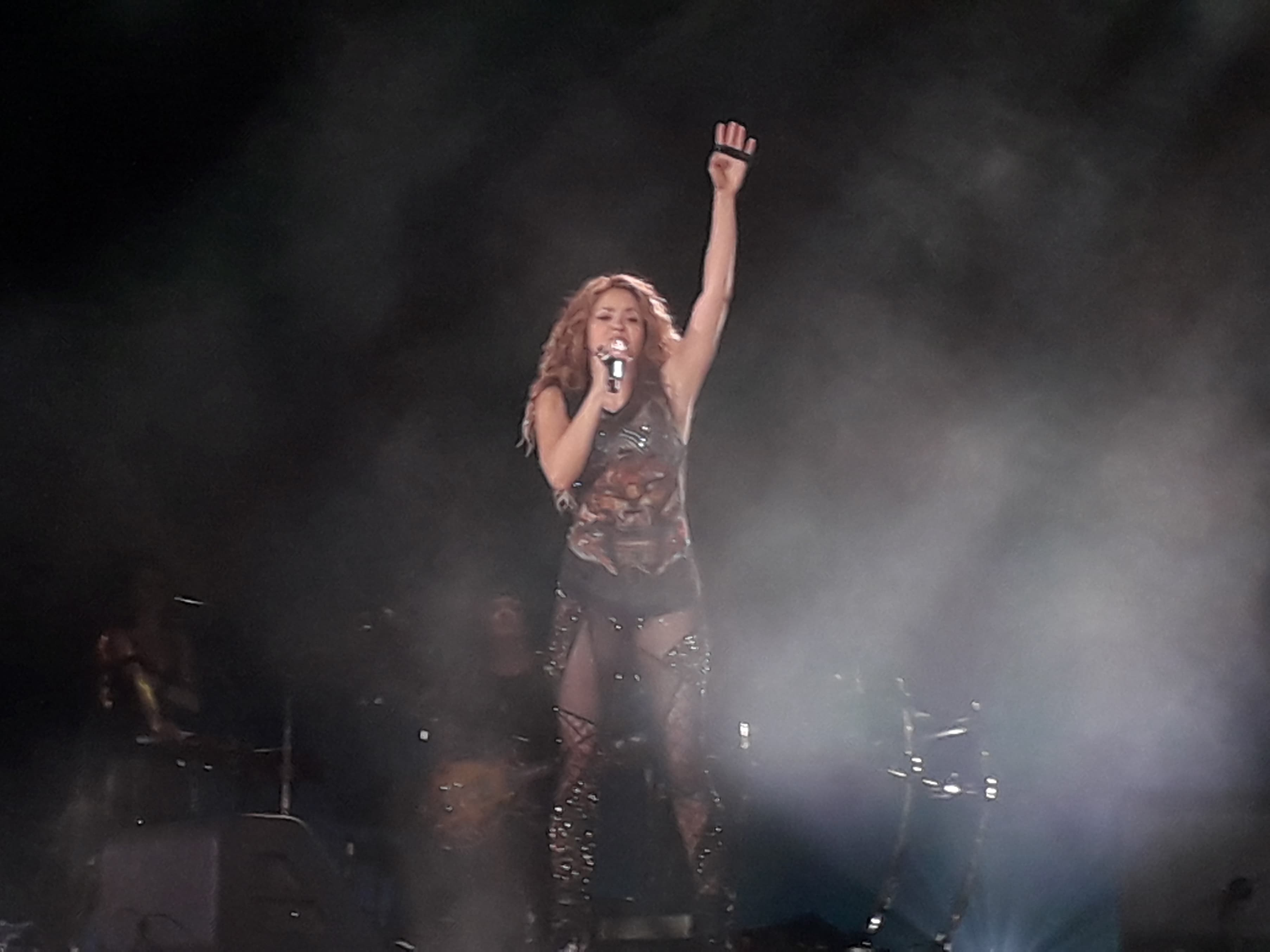 Shakira durante su gira: El dorado World Tour en Bogota Colombia